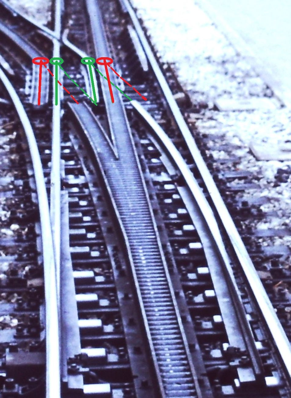 Zahnradbahn-Weiche mit tiefliegenden Riggenbach-Zahnstangen